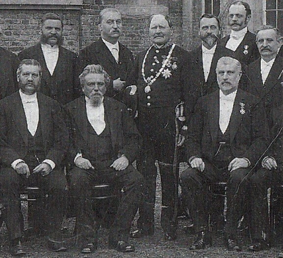 Detail van een foto met genodigden bij het 25-jarig jubileum van Willem Hubert Pijls (Pyls) als burgemeester van Maastricht. Geportretteerd zijn leden van de gemeenteraad en bestuursleden van het Burgerlijk Armbestuur.Staand: mr.G. Straetmans, mr. G.D. Franquinet, W.H. Pijls, Edm. Houtappel en mr. T.G. Ating van Geusau.Zittend: de wethouders J.A.H.W. Bonhomme, M.J. Marres en P.C.H. Bauduin. Fotocollectie RHCL Maastricht, collectie L.G.O.G., GAM 23784.